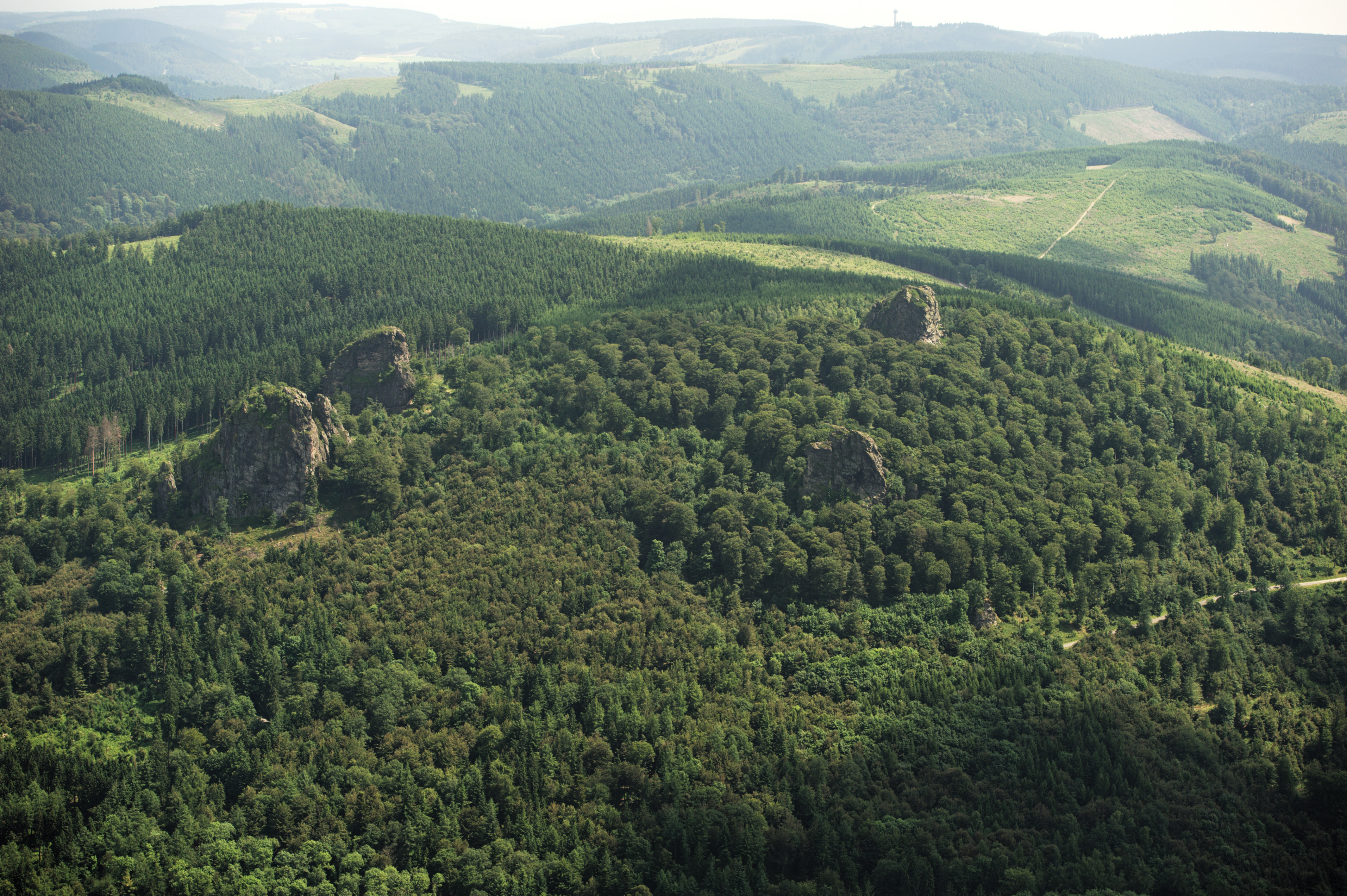 Bruchhauser Steine (bei Olsberg-Bruchhausen, Rothaargebirge, Nordrhein-Westfalen) aus der Luft: – links Bornstein, dahinter Goldstein, – rechts Ravenstein, dahinter Feldstein mit Hochheideturm (auf dem Ettelsberg, bei Willingen, Upland, Hessen) am Südost-Horizont (Fotoflug Sauerland-Ost) The making of this document was supported by the Community-Budget of Wikimedia Germany.